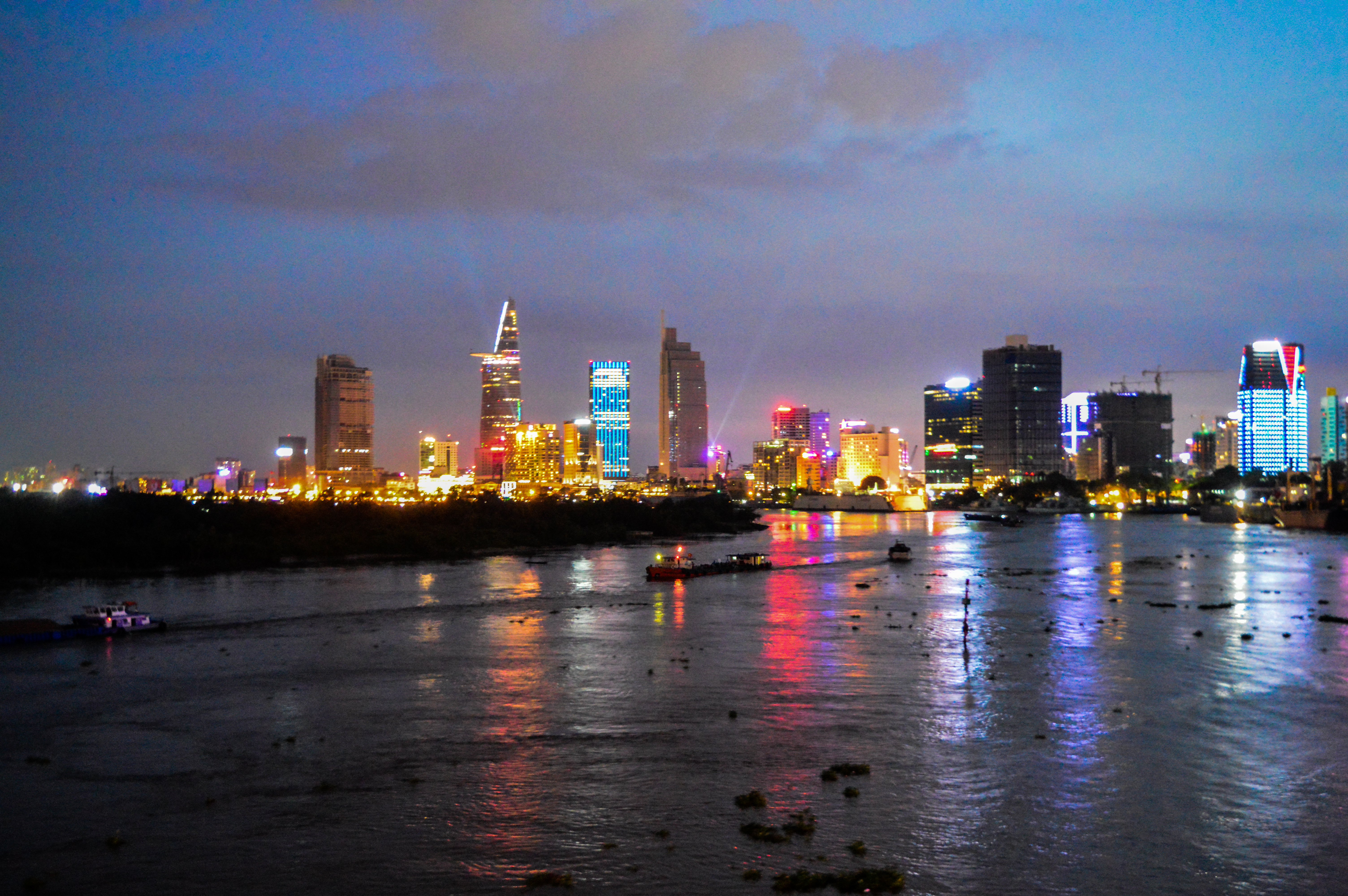 Saigon in-night, 2015.